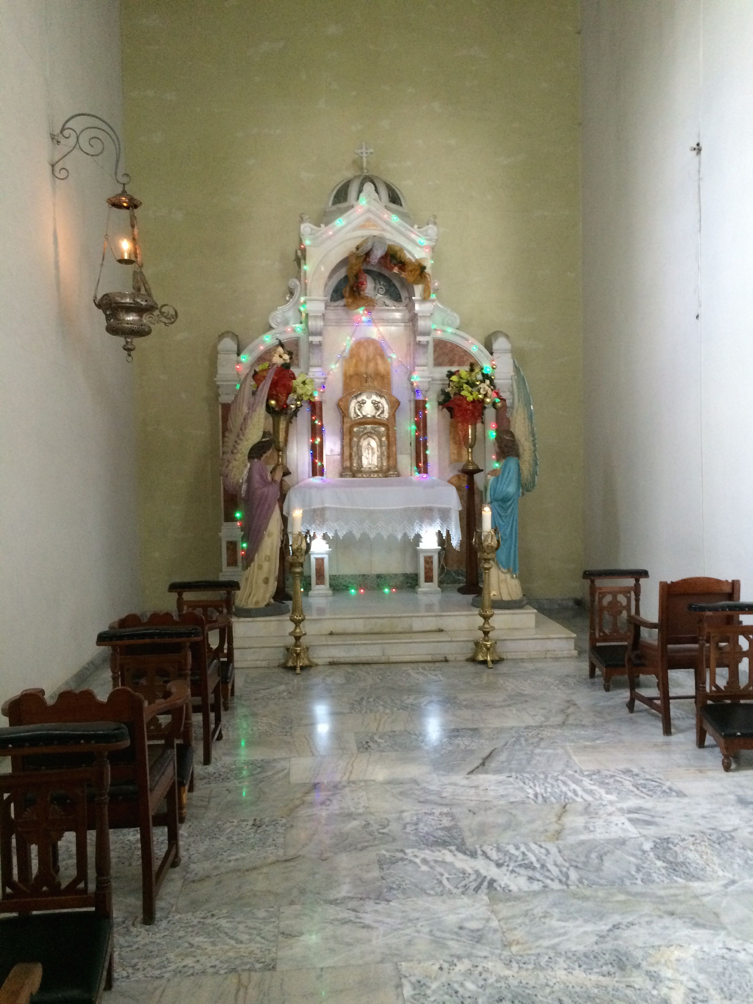 SANTA ROSA DE OSOS ANTIOQUIA - DETALLES DEL INTERIOR DE LA CATEDRAL Esta fotografía fue tomada en el municipio colombiano con código 05686.